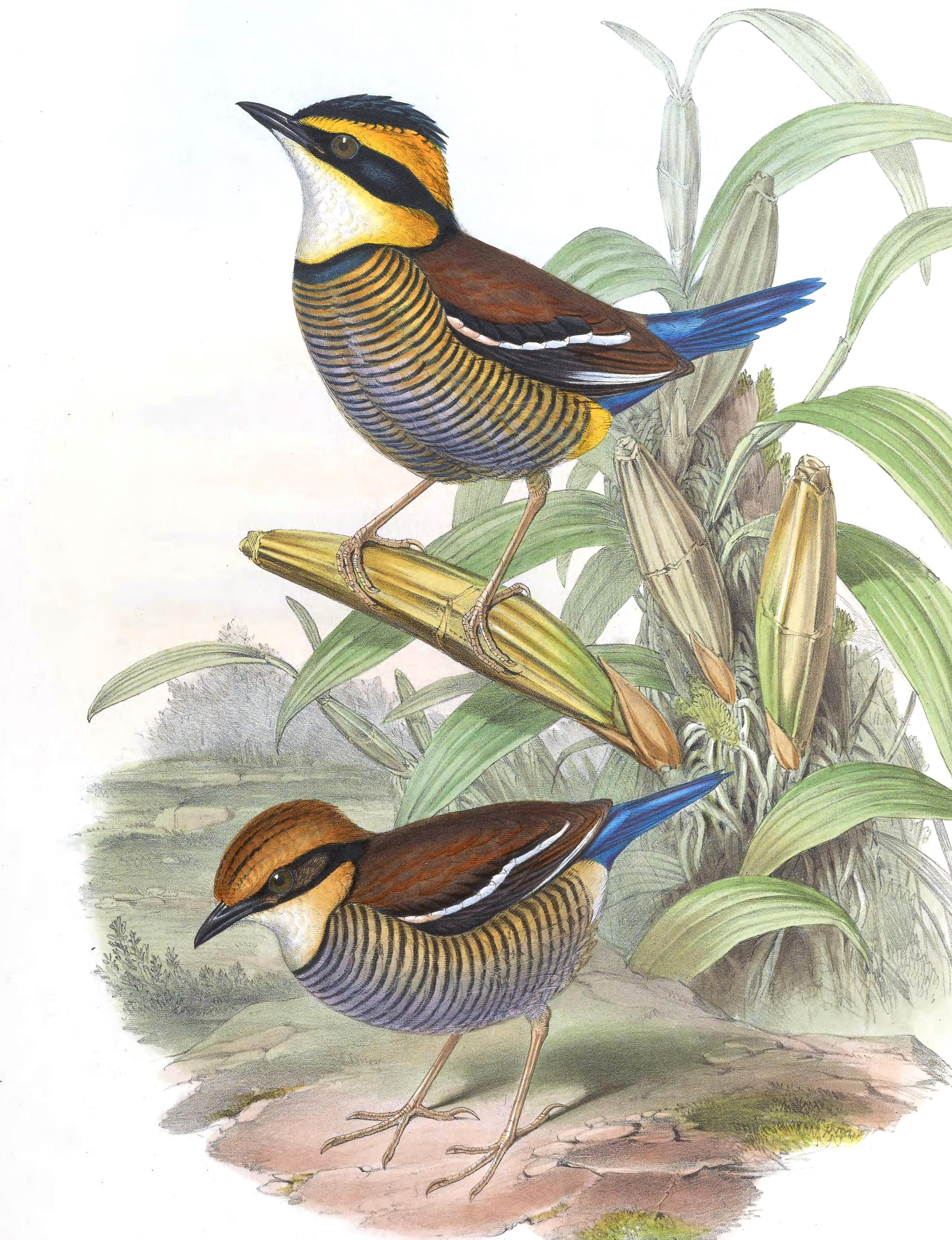 Pitta cyanura = Hydrornis (guajana) guajana